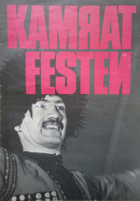 Kamratsfesten lehti